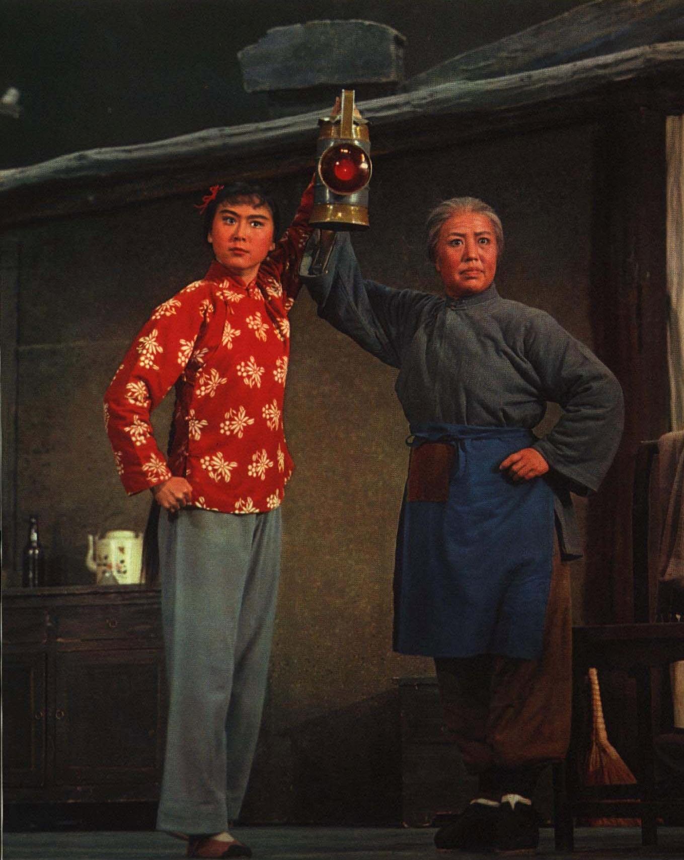 1967-08 1967年 红灯记